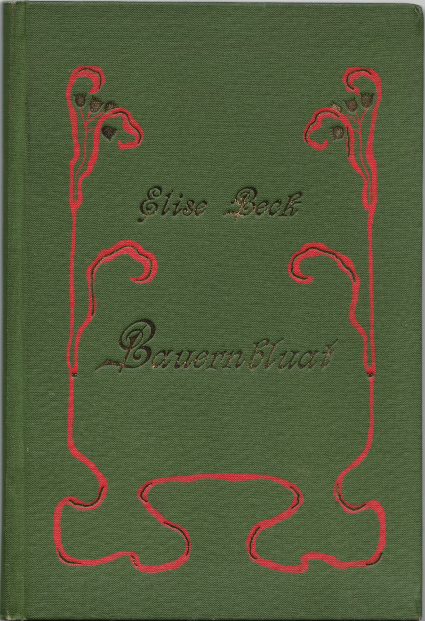 Titelseite der Gedichtsammlung 'Bauernbluat' von Elise Beck